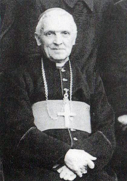 Monsignor Adriano Bernareggi, arcivescovo di Bergamo, nell'ultimo anno di vita (1953)